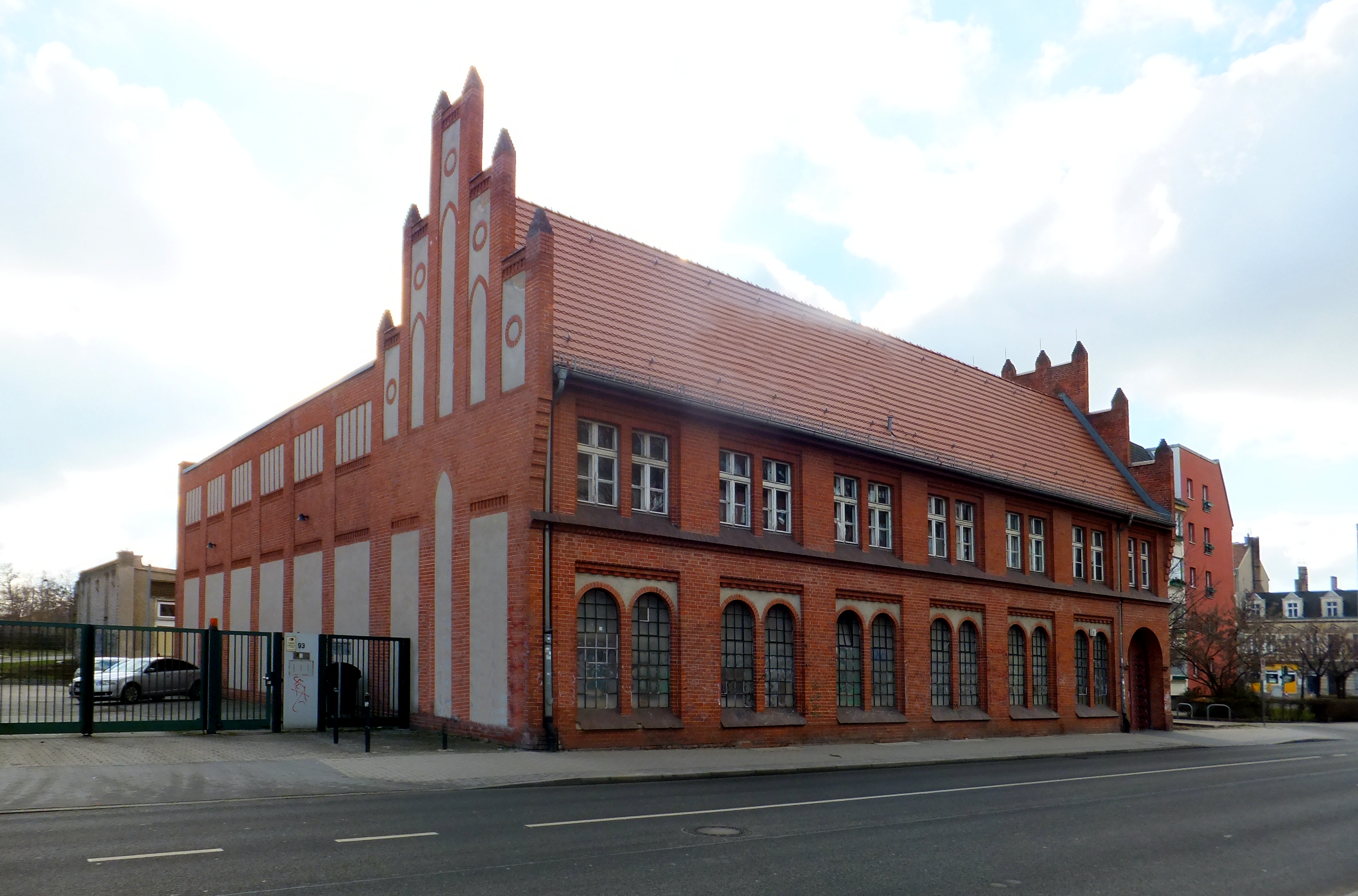 Wendenschloßstraße 93 in Köpenick, Pumpstation ; Schmierereien an der Fassade im Bild weggeputzt